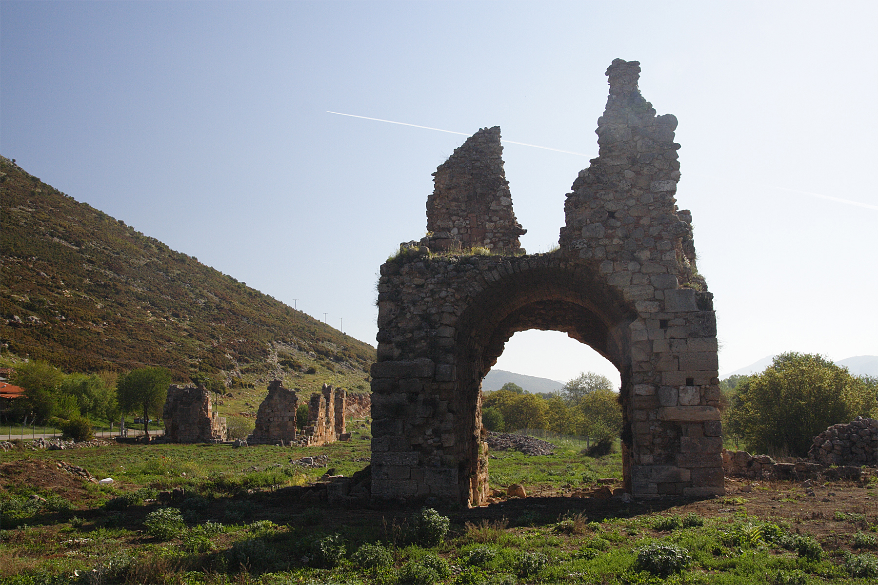 Kloster Zaraka, am See von Stymfalia, Peloponnes, Griechenland Als fränkisches Zisterzienser Kloster von ca. 1225 - 1280 geführt. Zaraka, Frankish-Cistercian monastery at lake Stymfalia, Peloponnese, Greece. Run as a monastery ca. 1225 - 1280. left/links: Mount Ziria 2374m; right/rechts lake/See Stymfalia